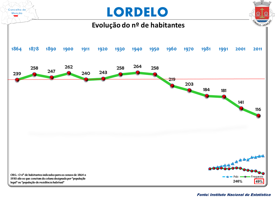 Censos 1864/2011